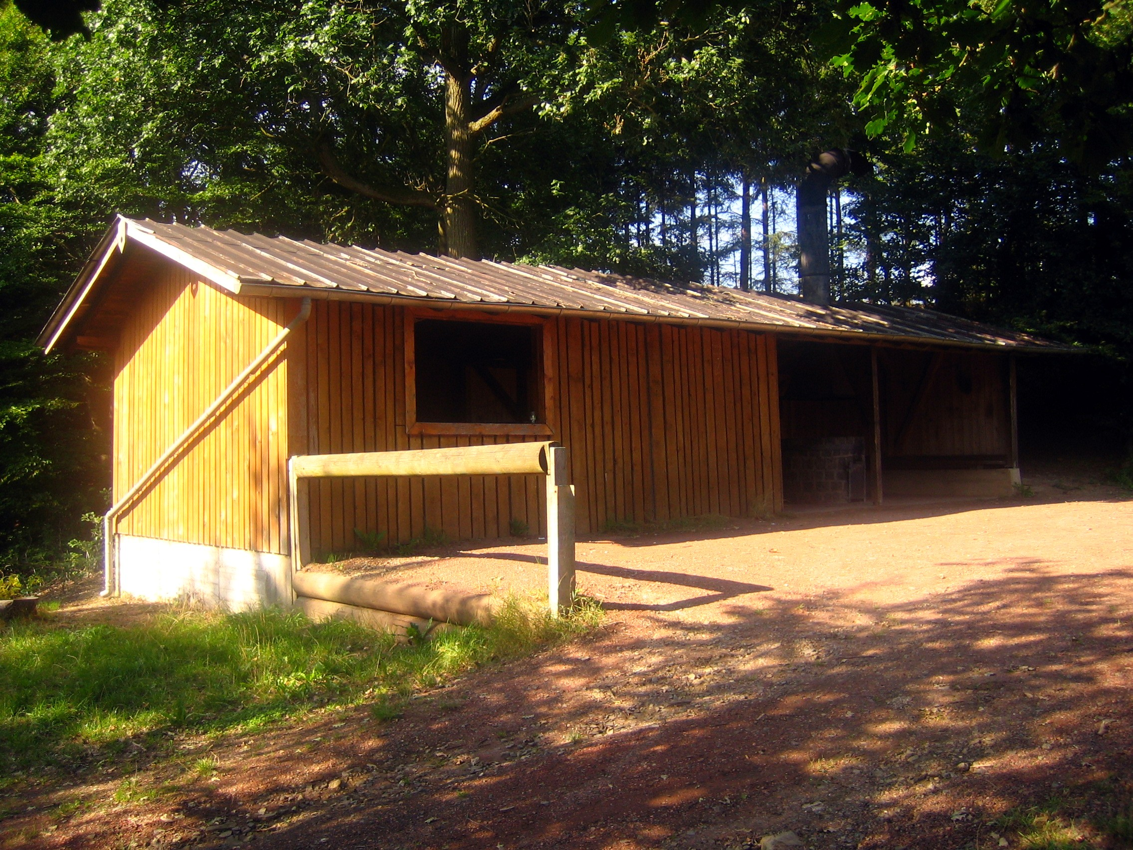 Schutzhütte